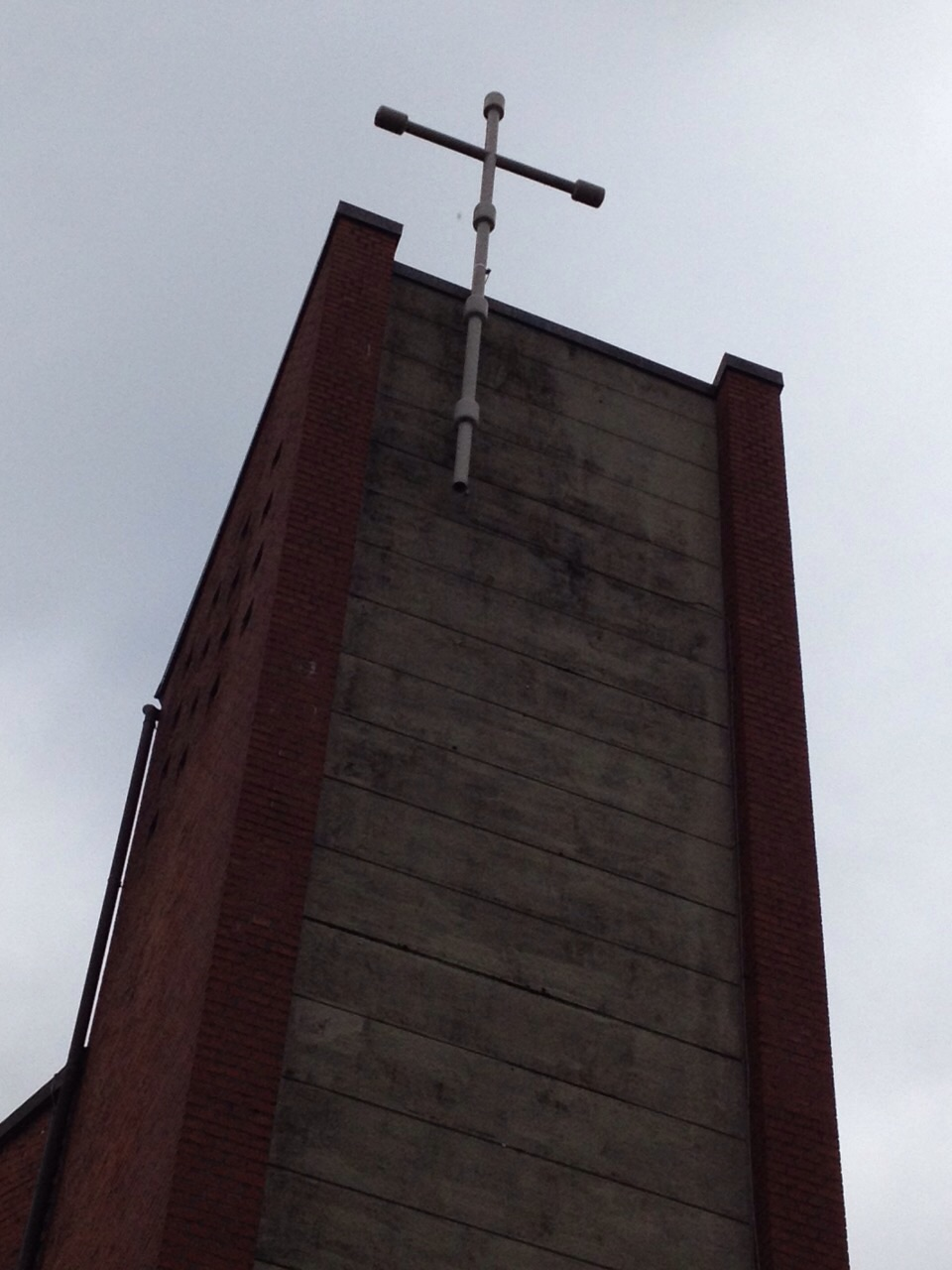 Glockenturm mit Glockenlöchern an der Seite.